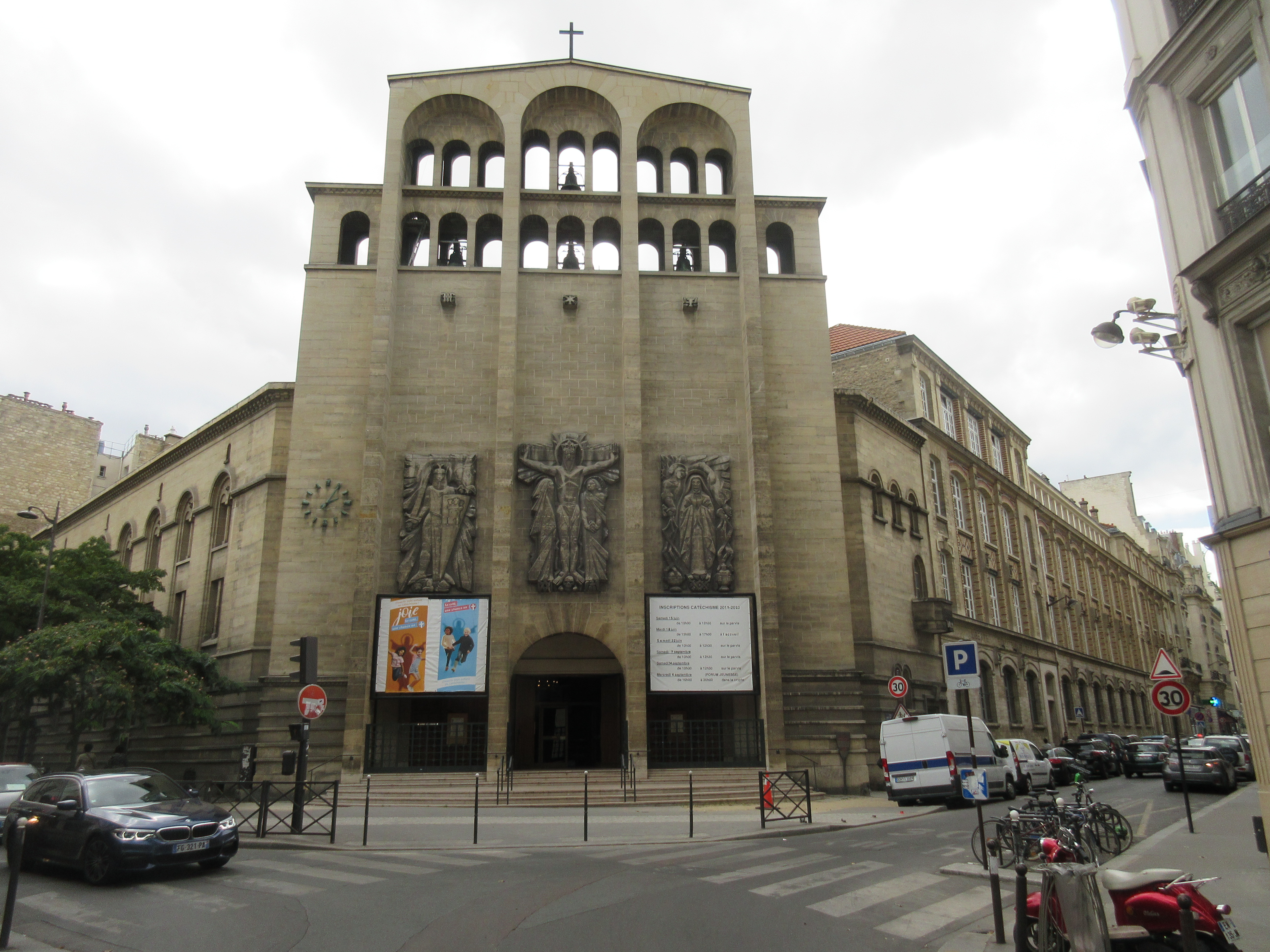 Emplacement panneau Histoire de Paris «Villa des Ternes » situé devant l'église Saint-Ferdinand-des-Ternes